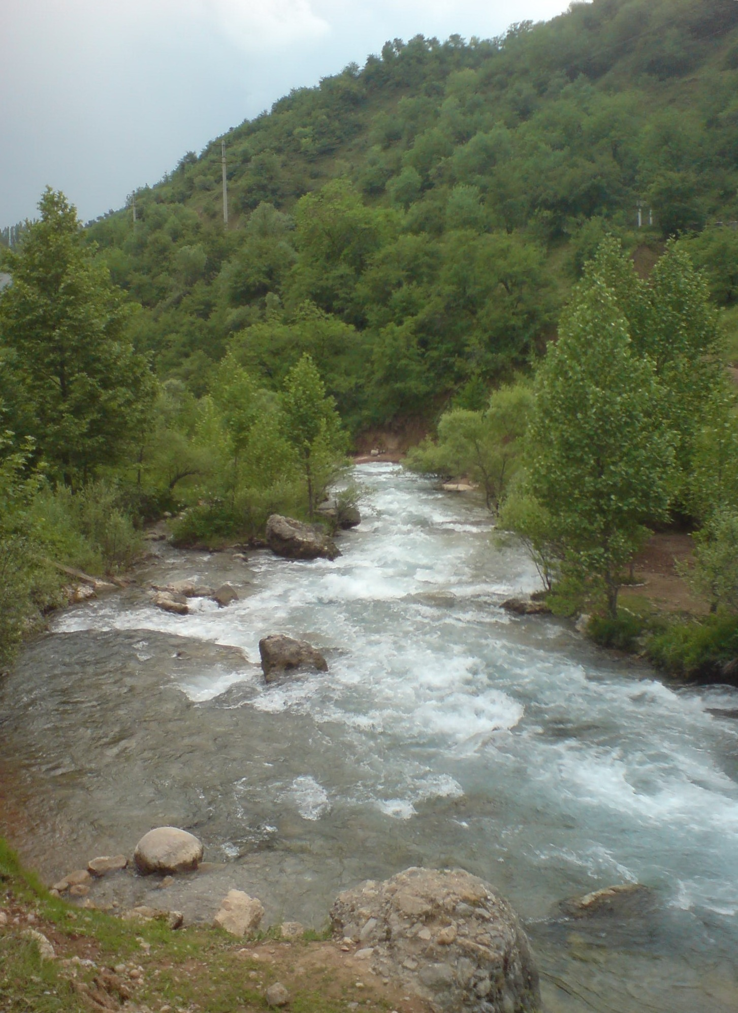 Наувалысай - горная река в Бостанлыкском тумане Ташкентского вилоята, впадающая в Чарвакское водохранилище, зона отдыха немного выше устья